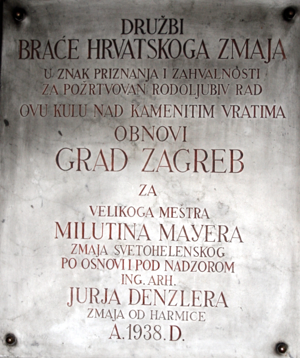 Spomen ploča na ulazu u Družbu Braća hrvatskog zmaja kod Kamenitih vrata u Zagrebu